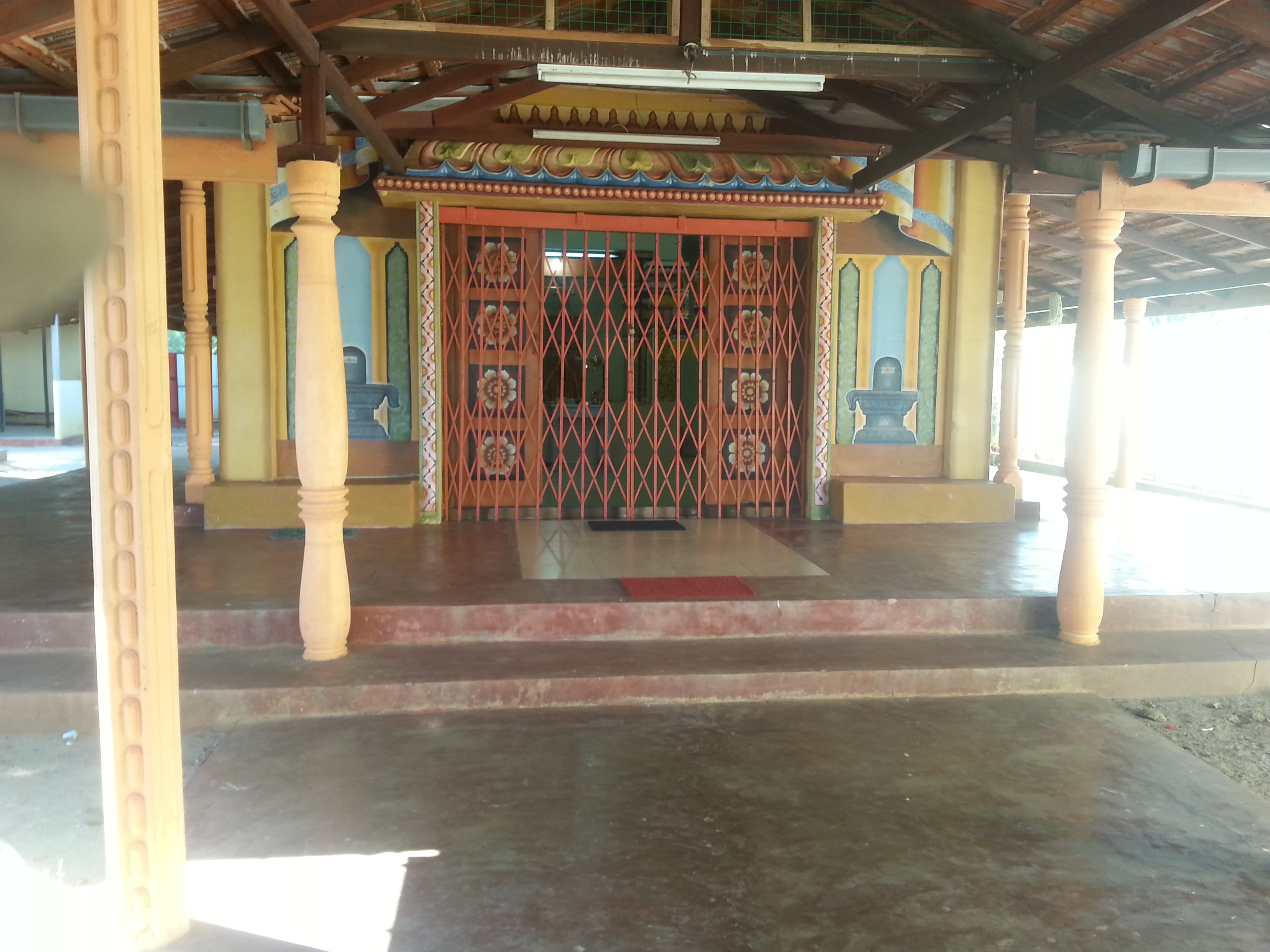 அருளம்பல சுவாமிகளின் சமாதியின் வெளிப்புற மண்டபத்தோற்றம்